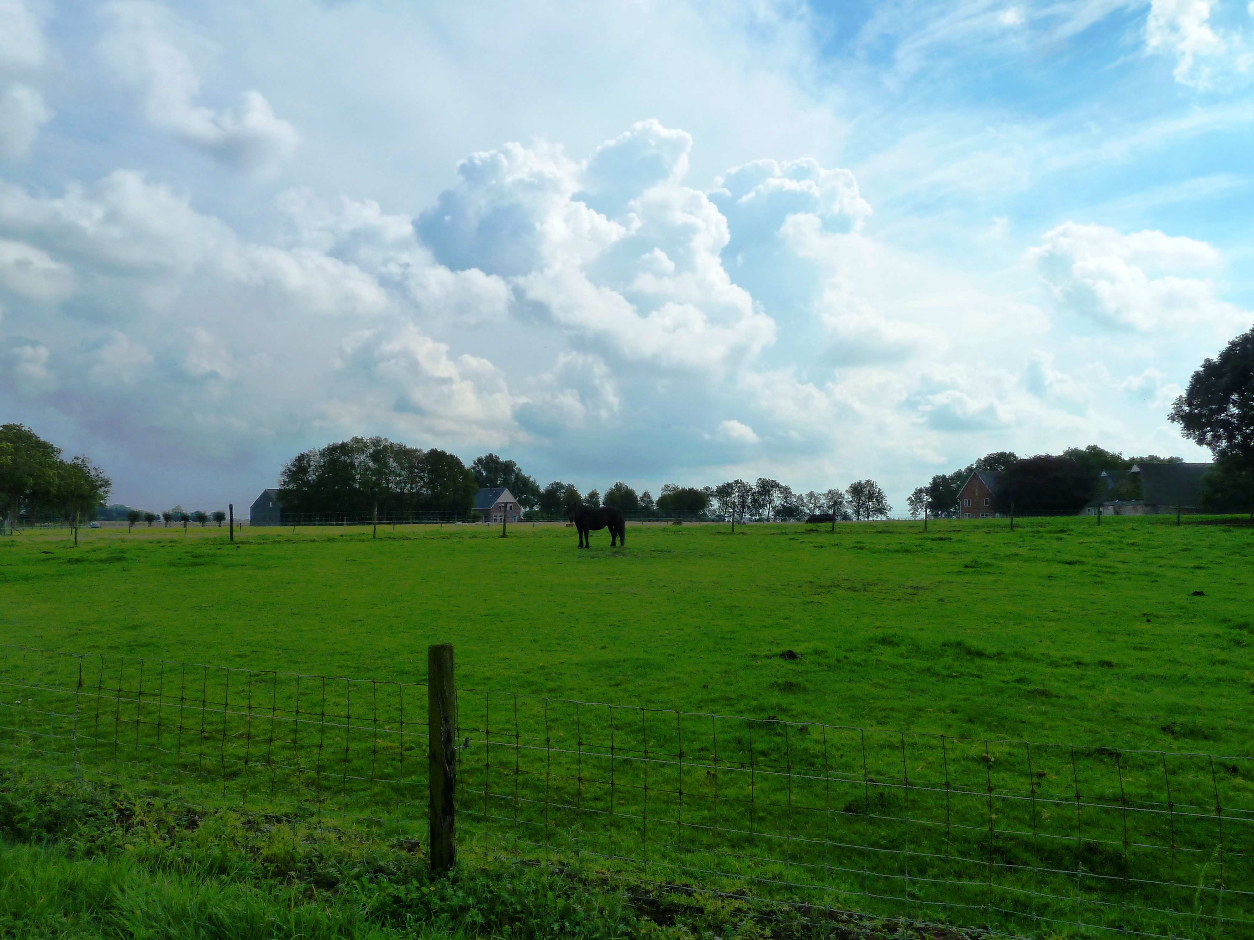 Gezicht op de wierde van Oldorp (Eemsmond, Groningen, Nederland) vanuit het noordwesten.